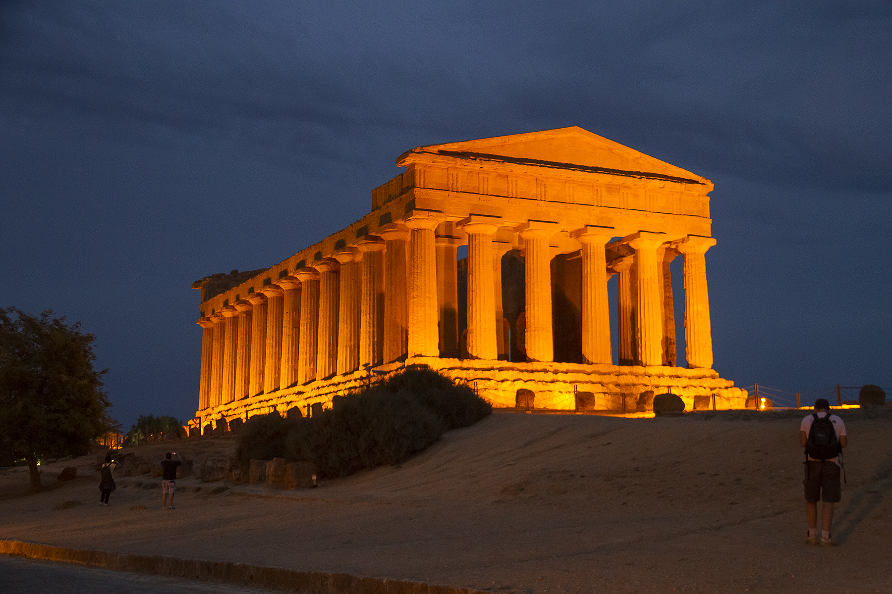 Valle dei Templi 3214